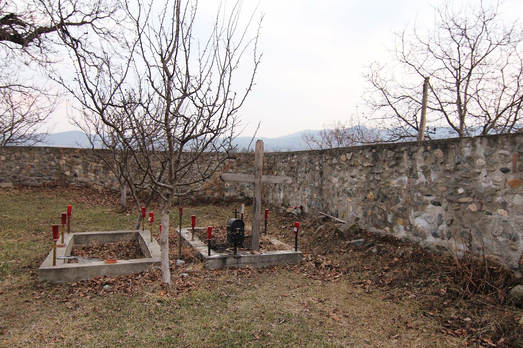 Zidul de incintă al bisericii 08